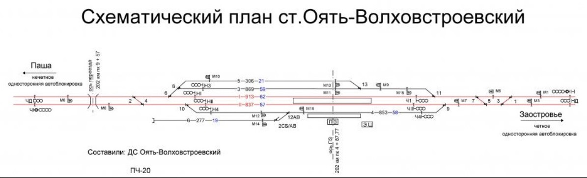 Схема путевого развития ст. Оять